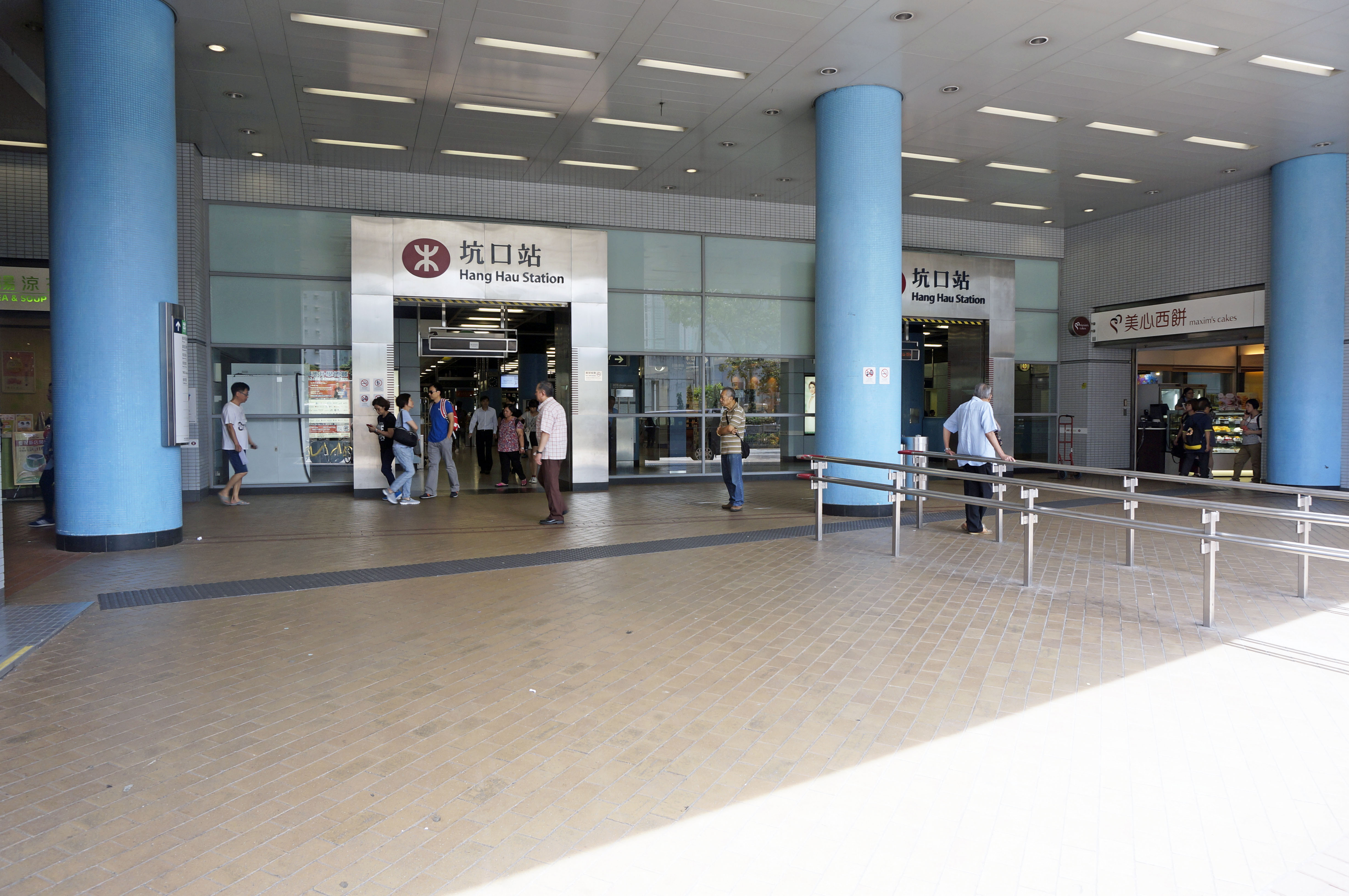 港鐵坑口站A出入口